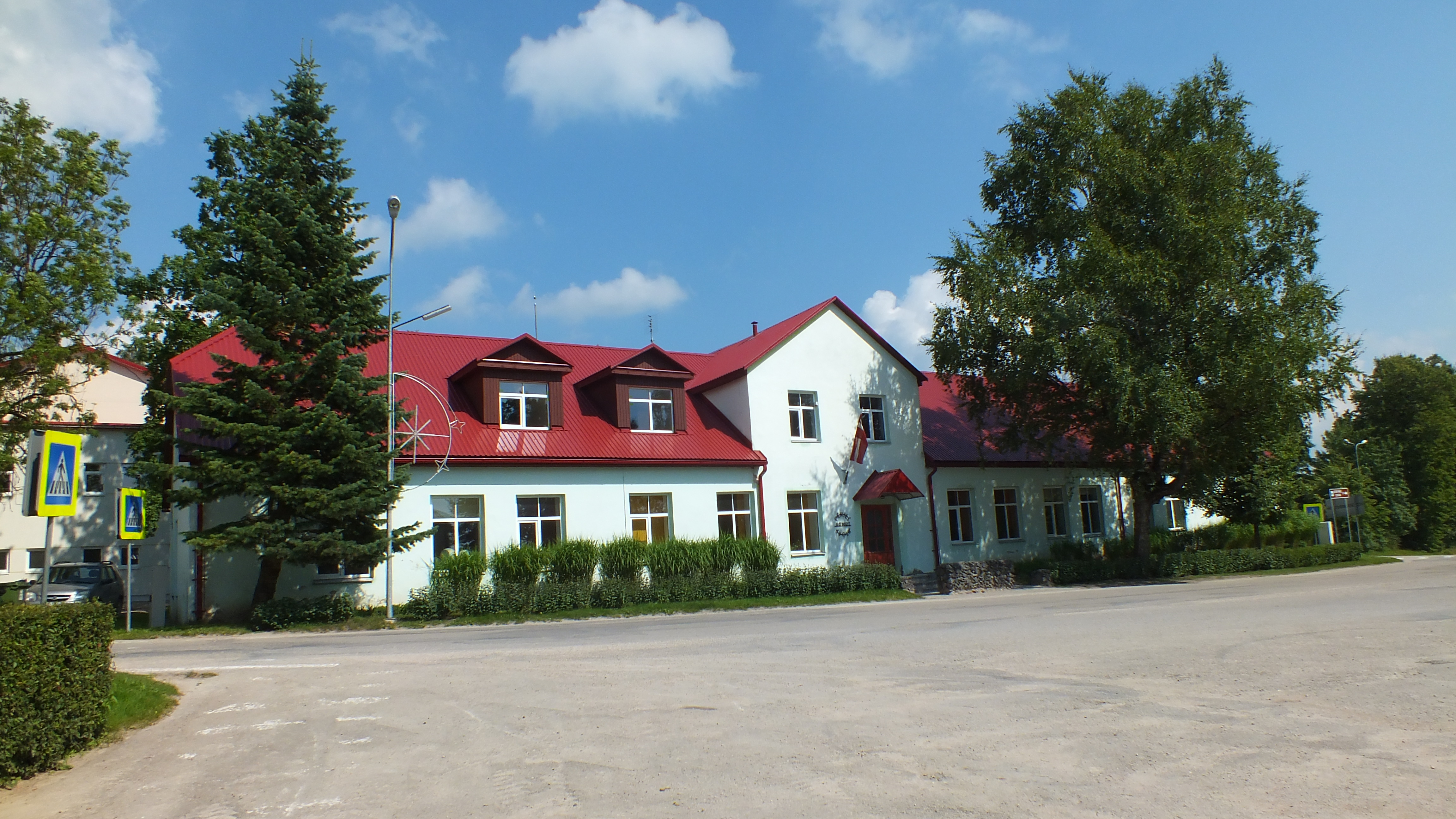 Pērses pamatskola Iršos